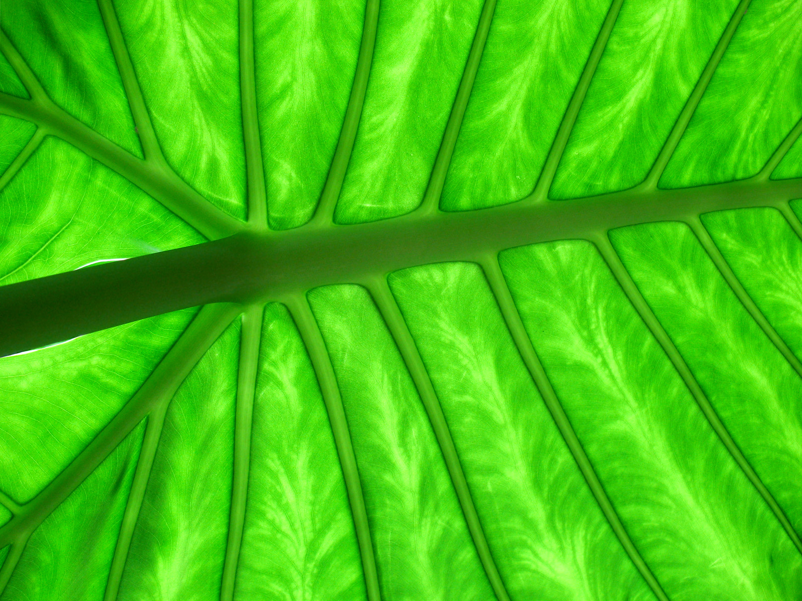 Colocasia esculenta leaf